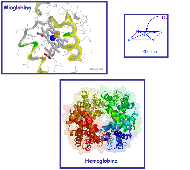 Globina, hemoglobina eta mioglobinaren arteko diferentzia